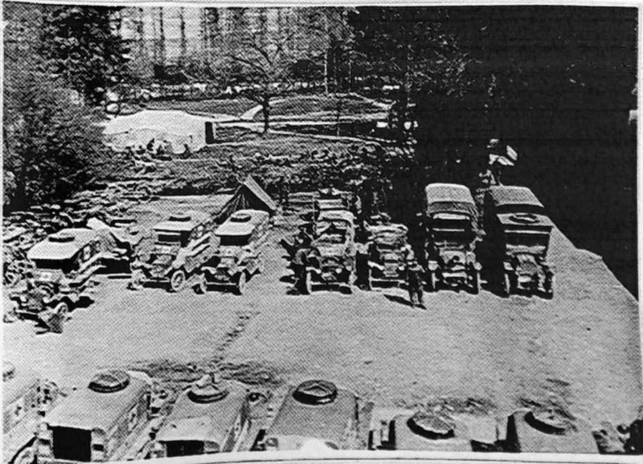 par une vue ancienne.